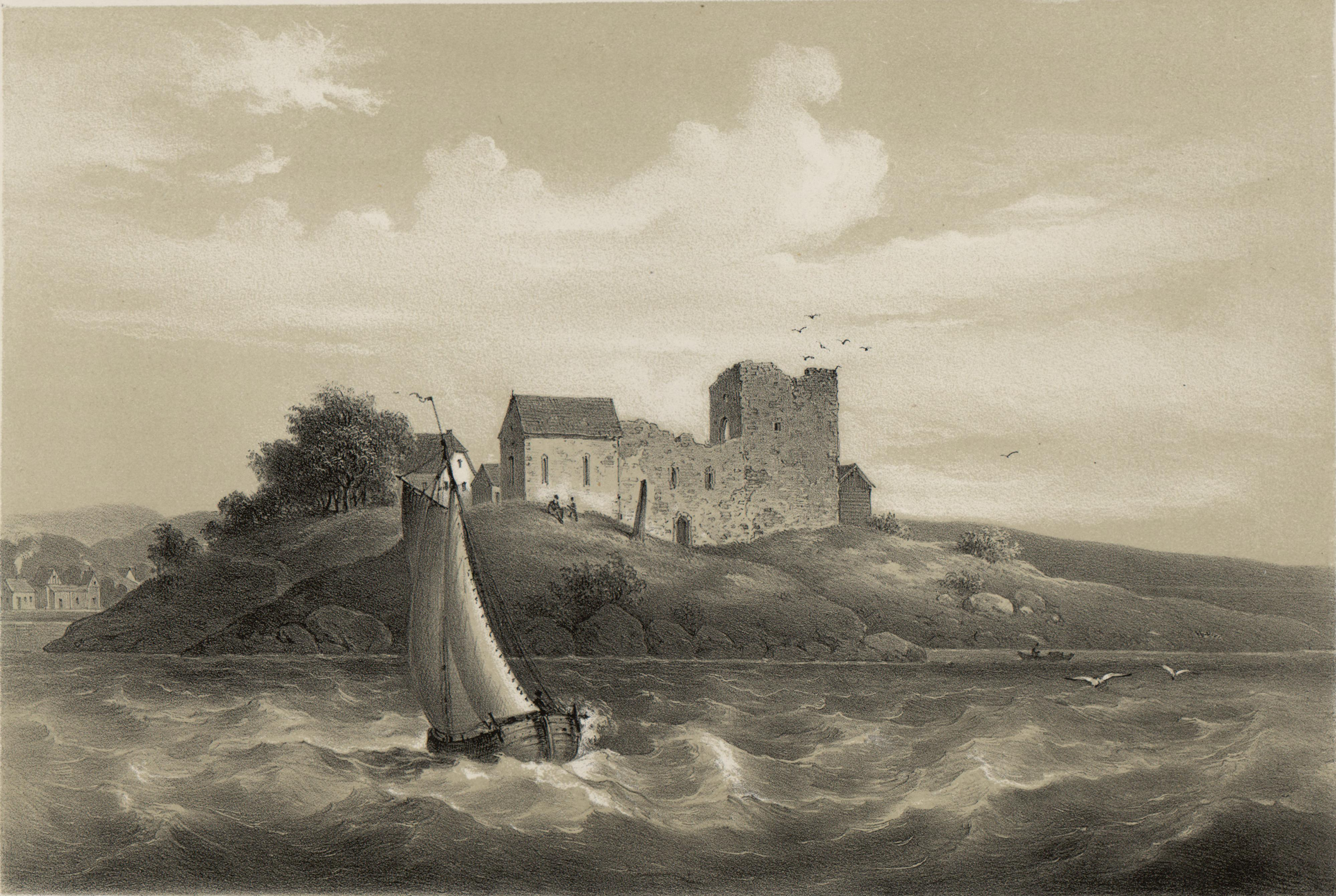 Illustrasjon hentet fra boken "Norge fremstillet i Tegninger" av Asbjørnsen, P.Chr. og utgitt av Chr. Tønsberg (no, 1848)